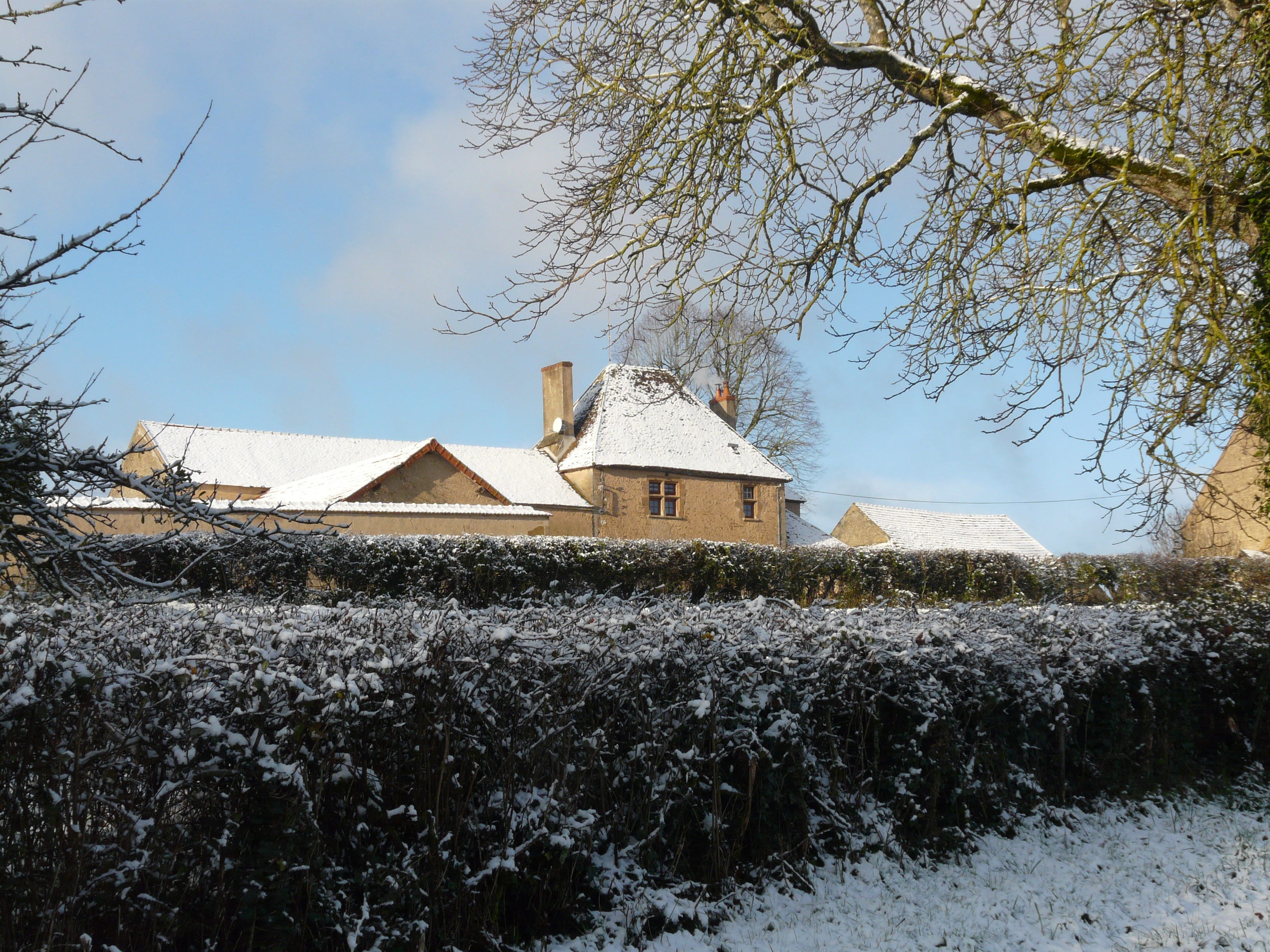 Commun Nord, actuelle ferme du château